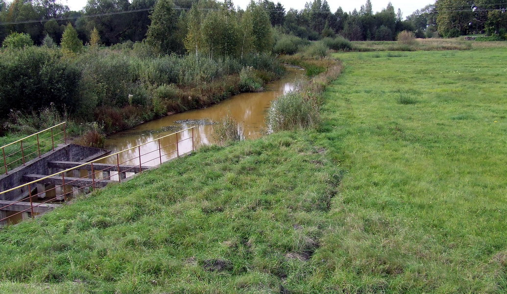 Rovėja už Papilio tvenkinio, Biržų raj.